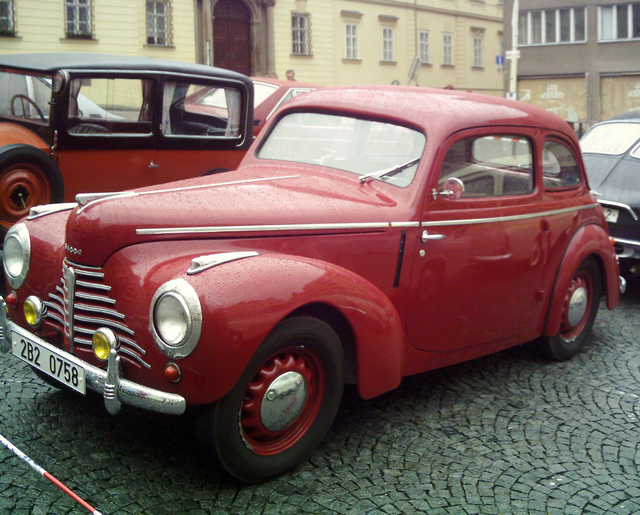 Škoda 1101 Tudor na Dominikánském náměstí v Brně.